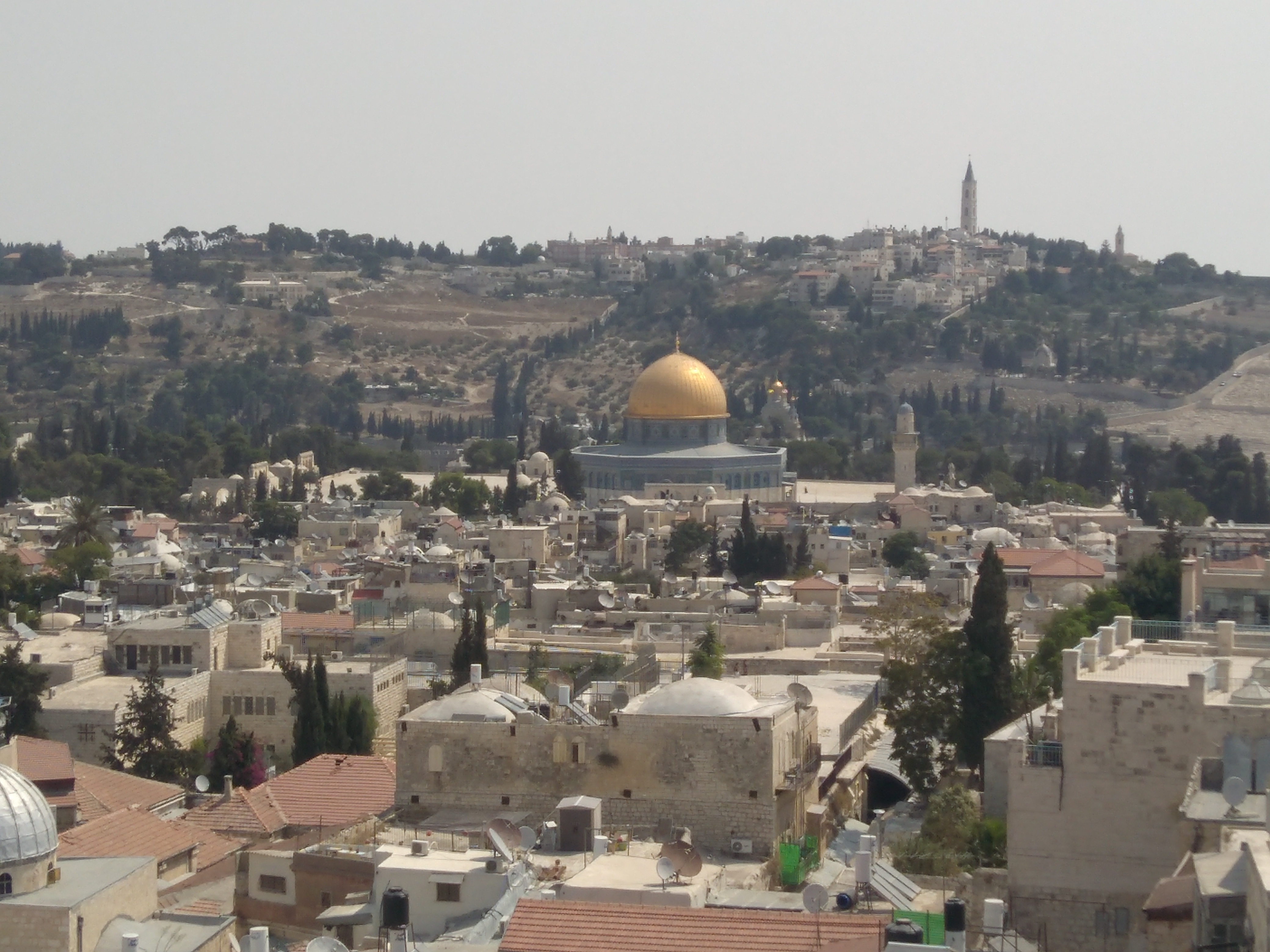 Vista de Jerusalén desde la Torre de David